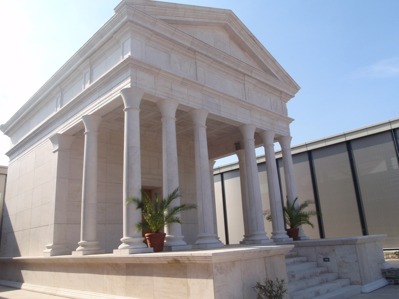 Szombathely ISIS szentély közeli képe az Iseum Savariense területén